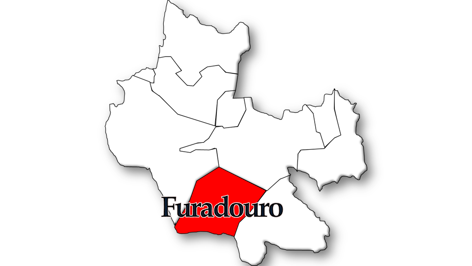 População